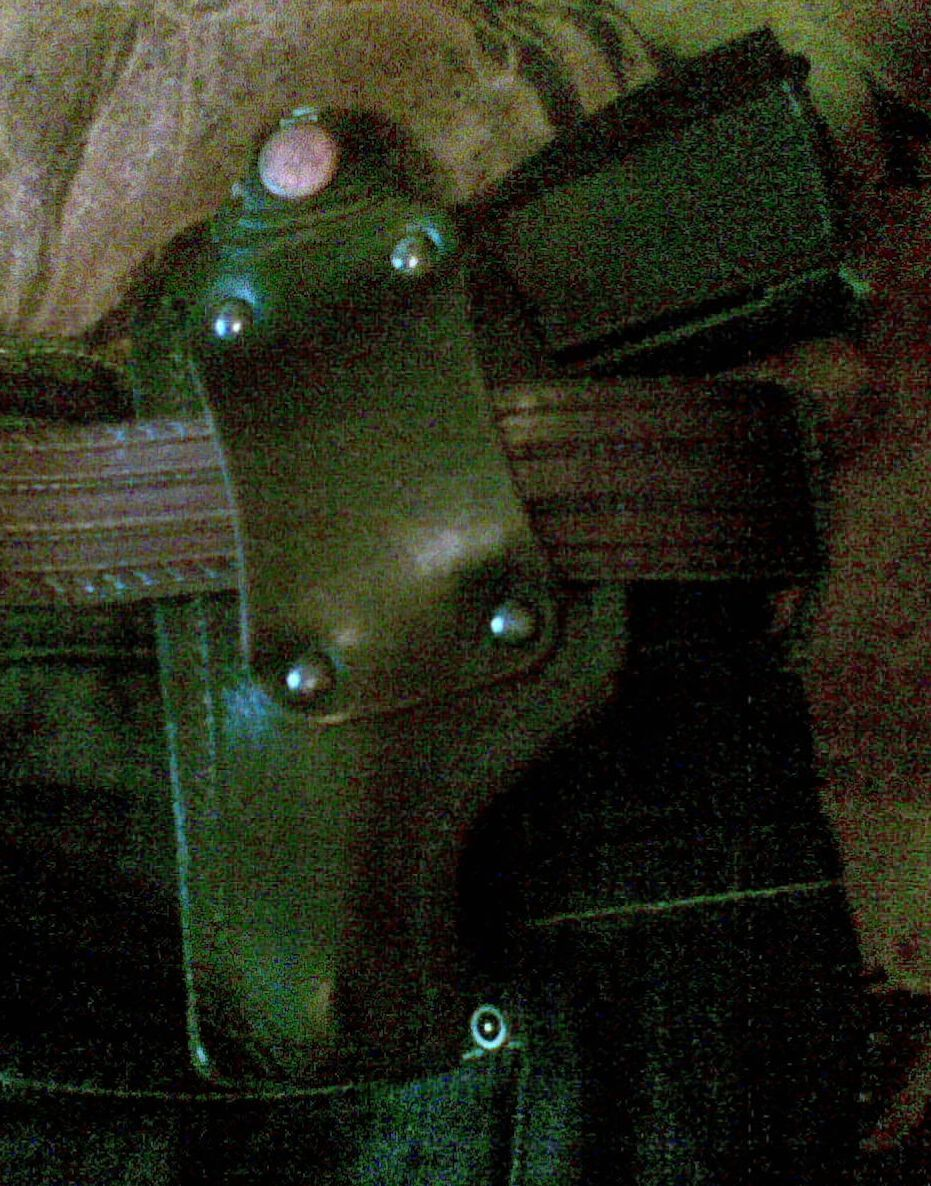 Пример скрытого ношения "Макарыча" на поясе